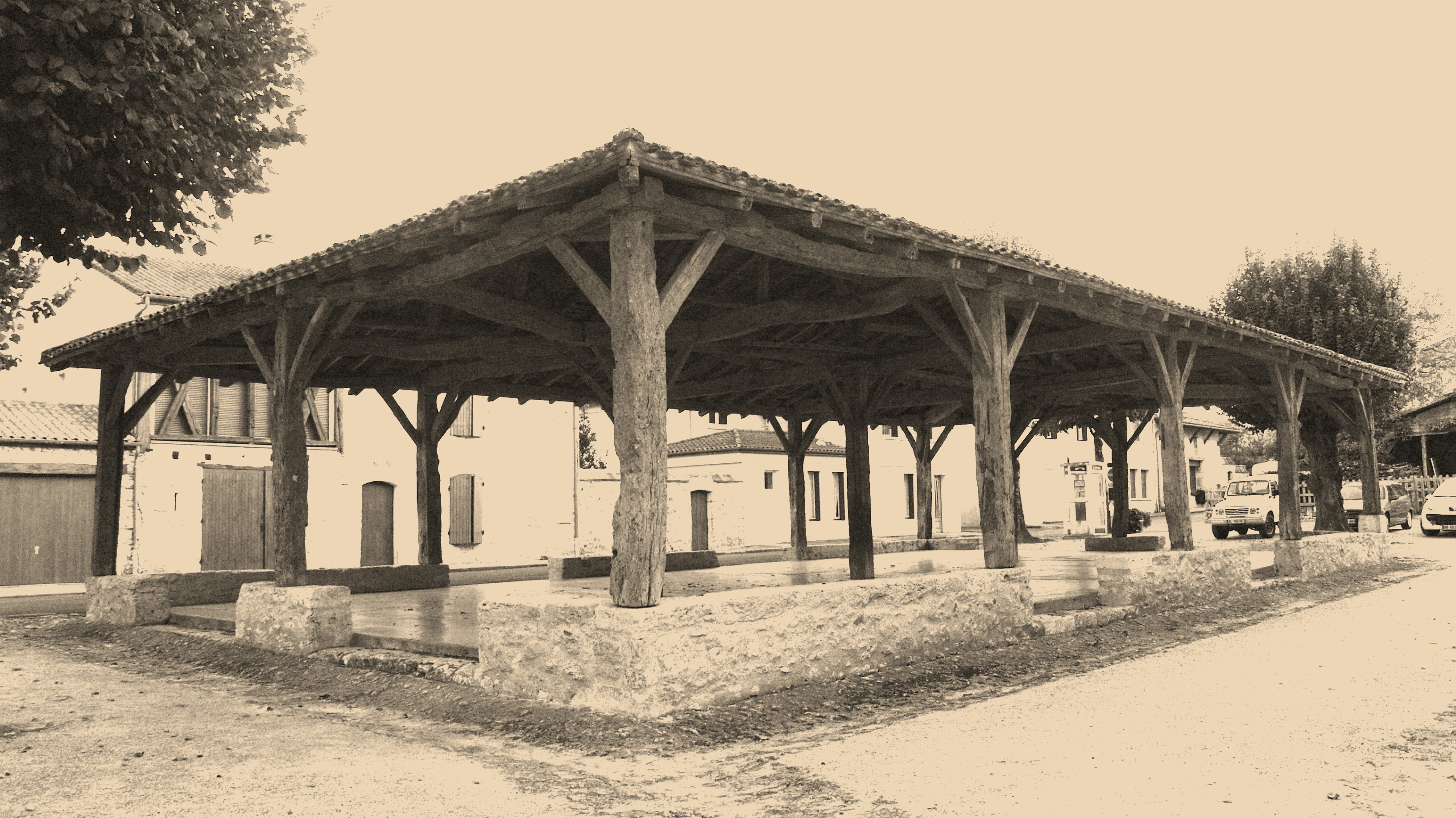 vue d'ensemble de la Halle de Laparade .